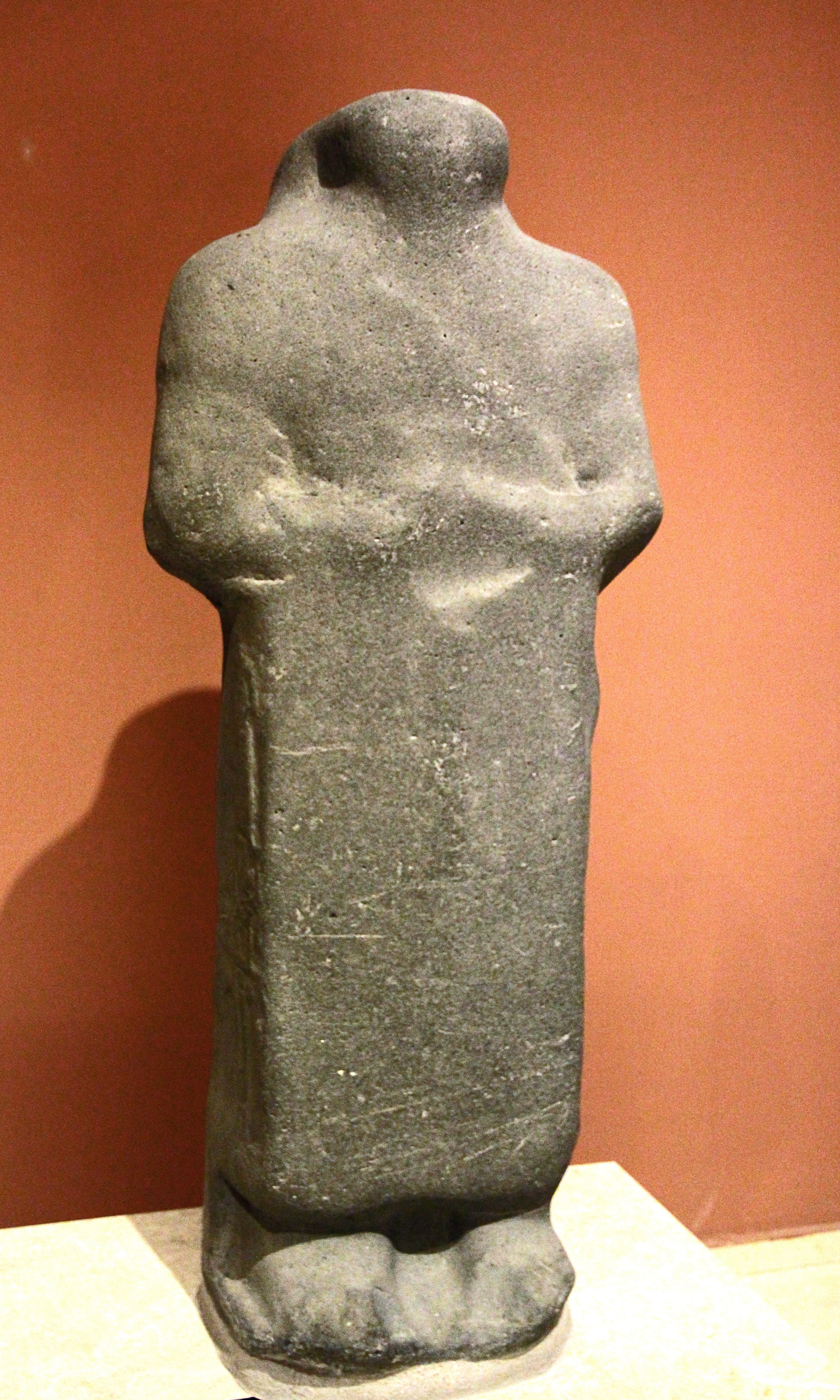 Archäologisches Museum Kahramanmaraş, Türkei, späthethitische Statue, Hawkins-Nummer Maras 13